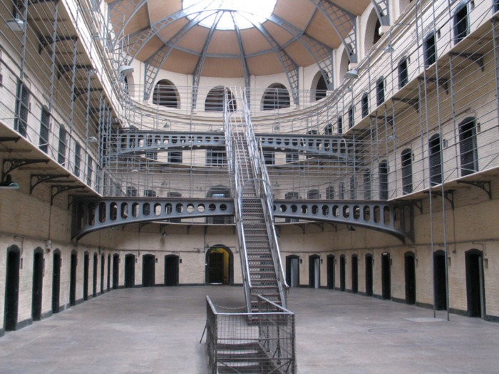 Im Kilmainham-Gefängnis